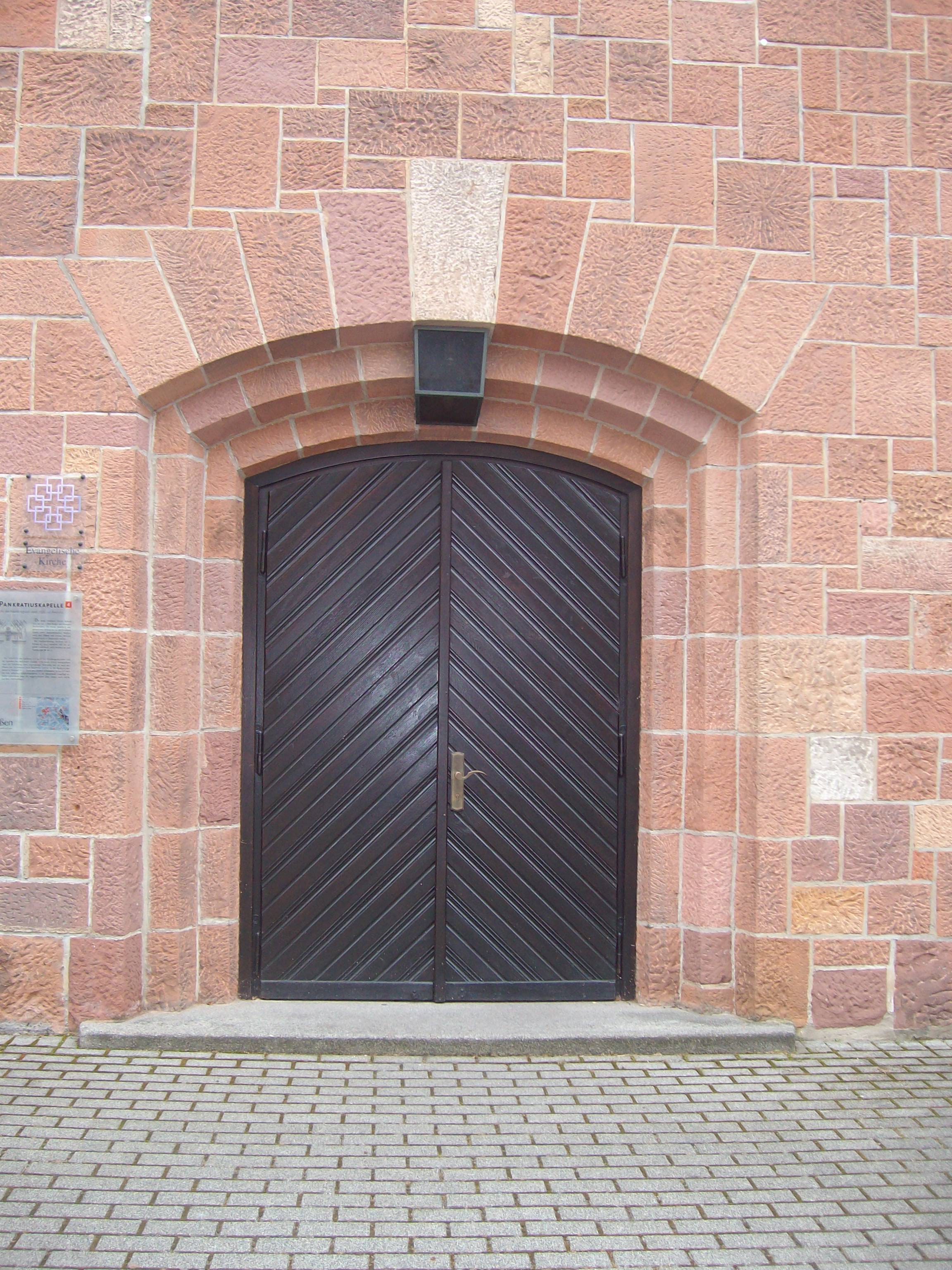 Portal der Pankratiuskapelle Gießen, Hessen, Deutschland